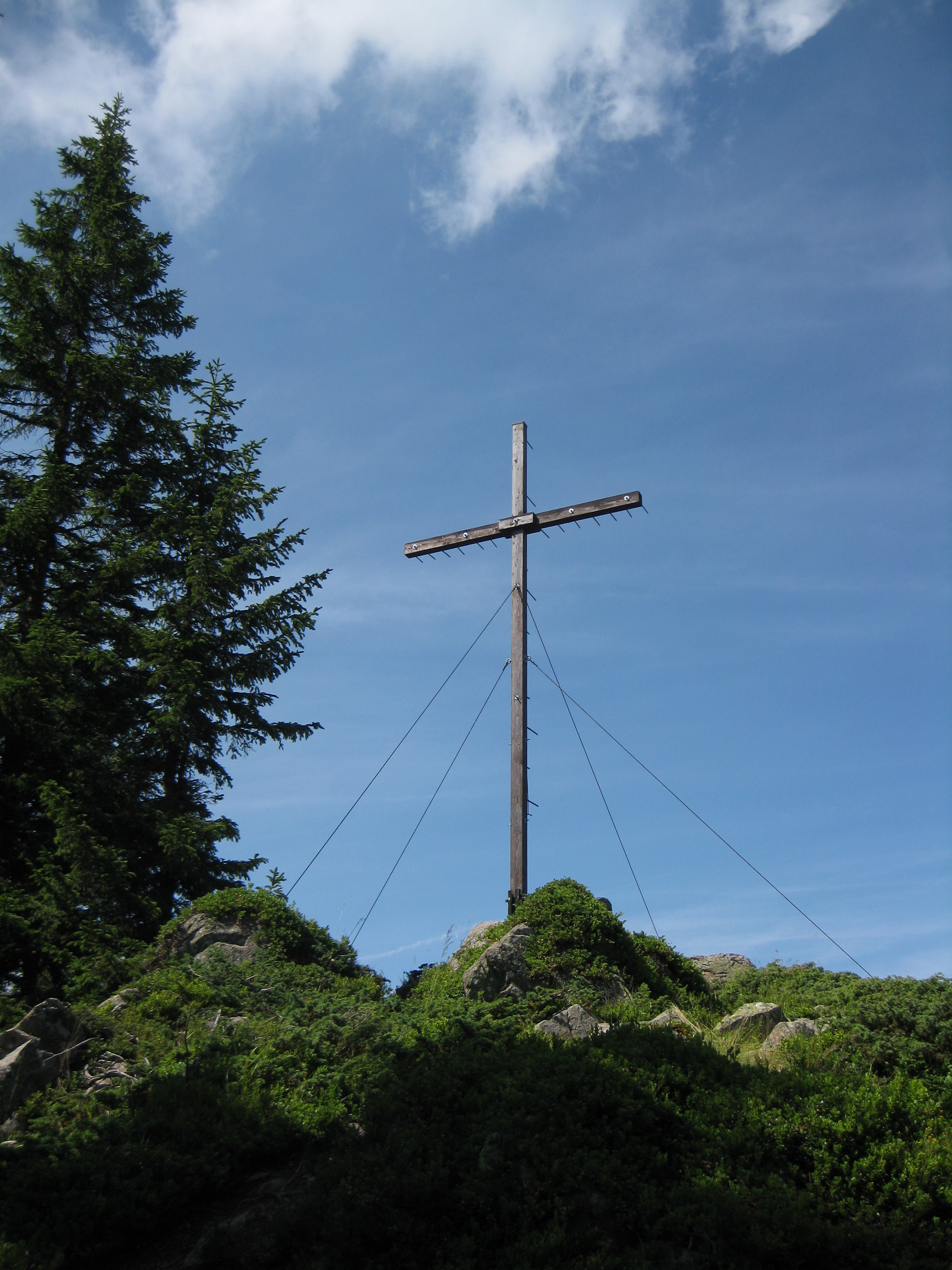 Das 2006 errichtete Gipfelkreuz des Trudner Horns in Südtirol